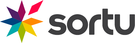 Sortu alderdiaren logotipoa